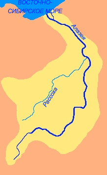 Схема бассейна реки Алазея